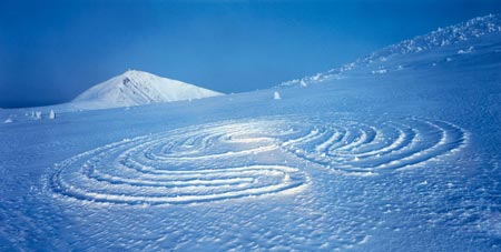 Jan Pohribný, fotografické dílo